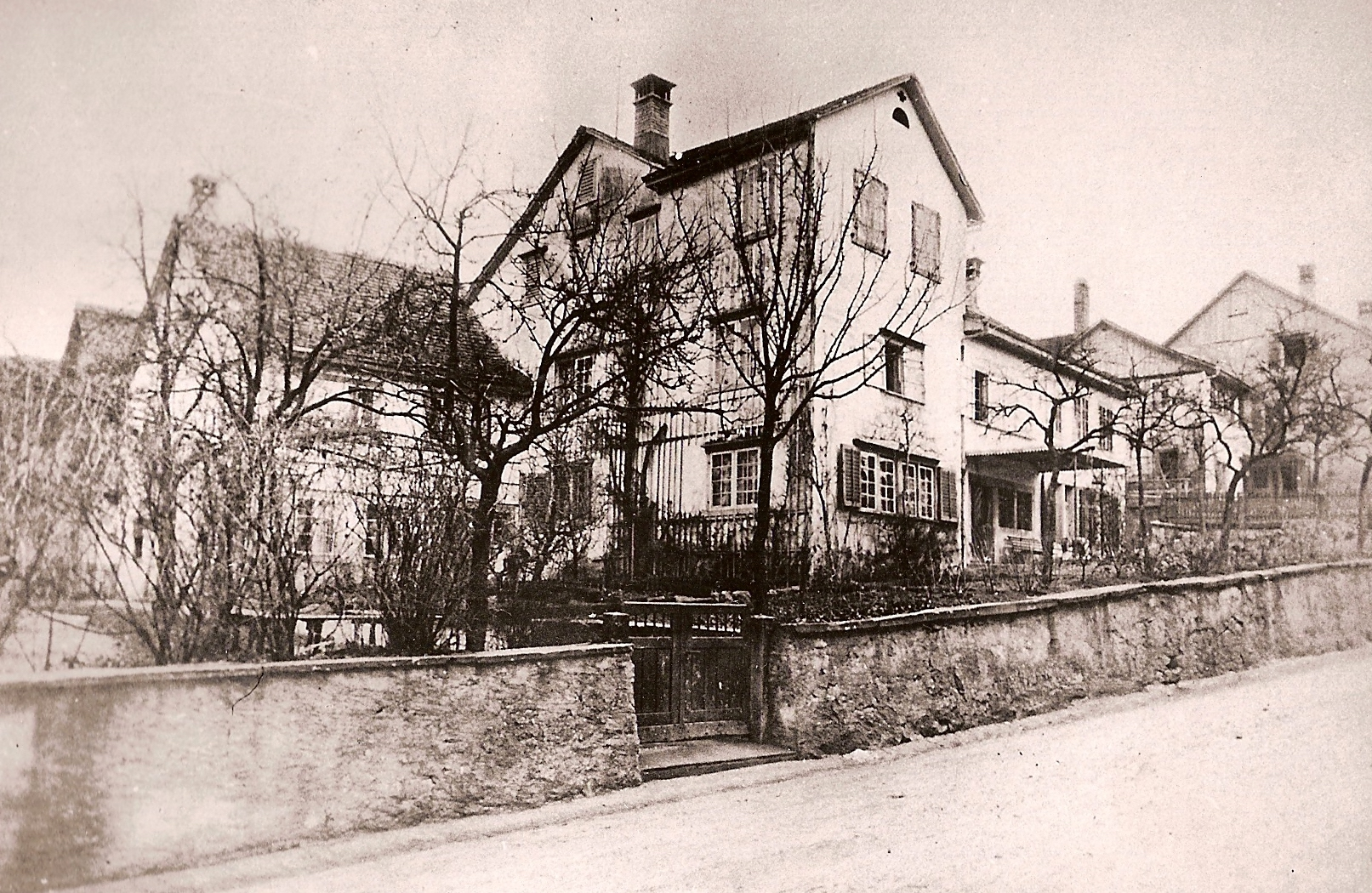 Obristenhof in Zollikon 1914 vor Umbau